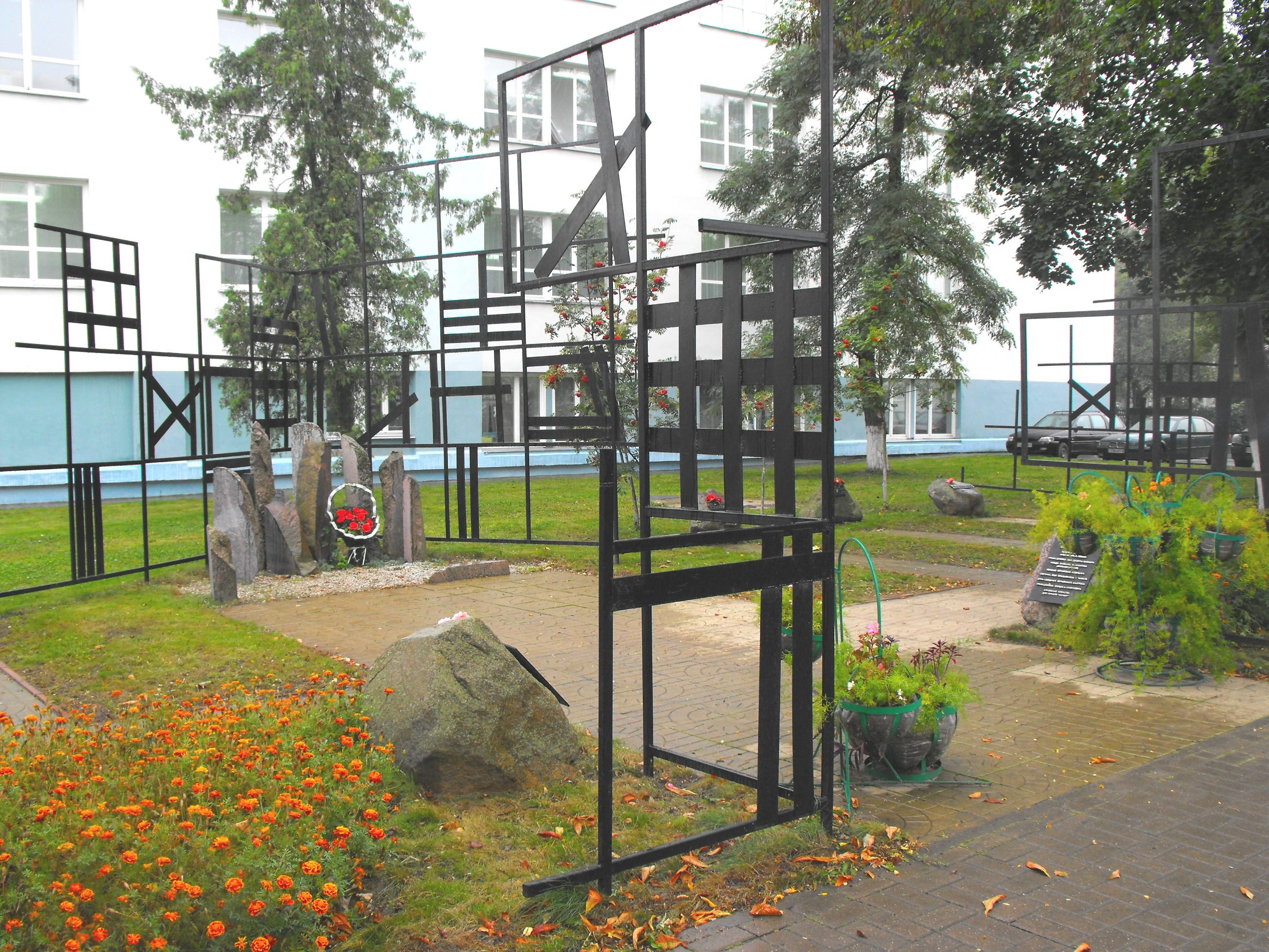 Мемориальный комплекс в центре Слуцка на улице Копыльской в память убитых евреев - узников Слуцкого гетто. Возведён в 2007 году. Автор проекта - Леонид Менделевич Левин.